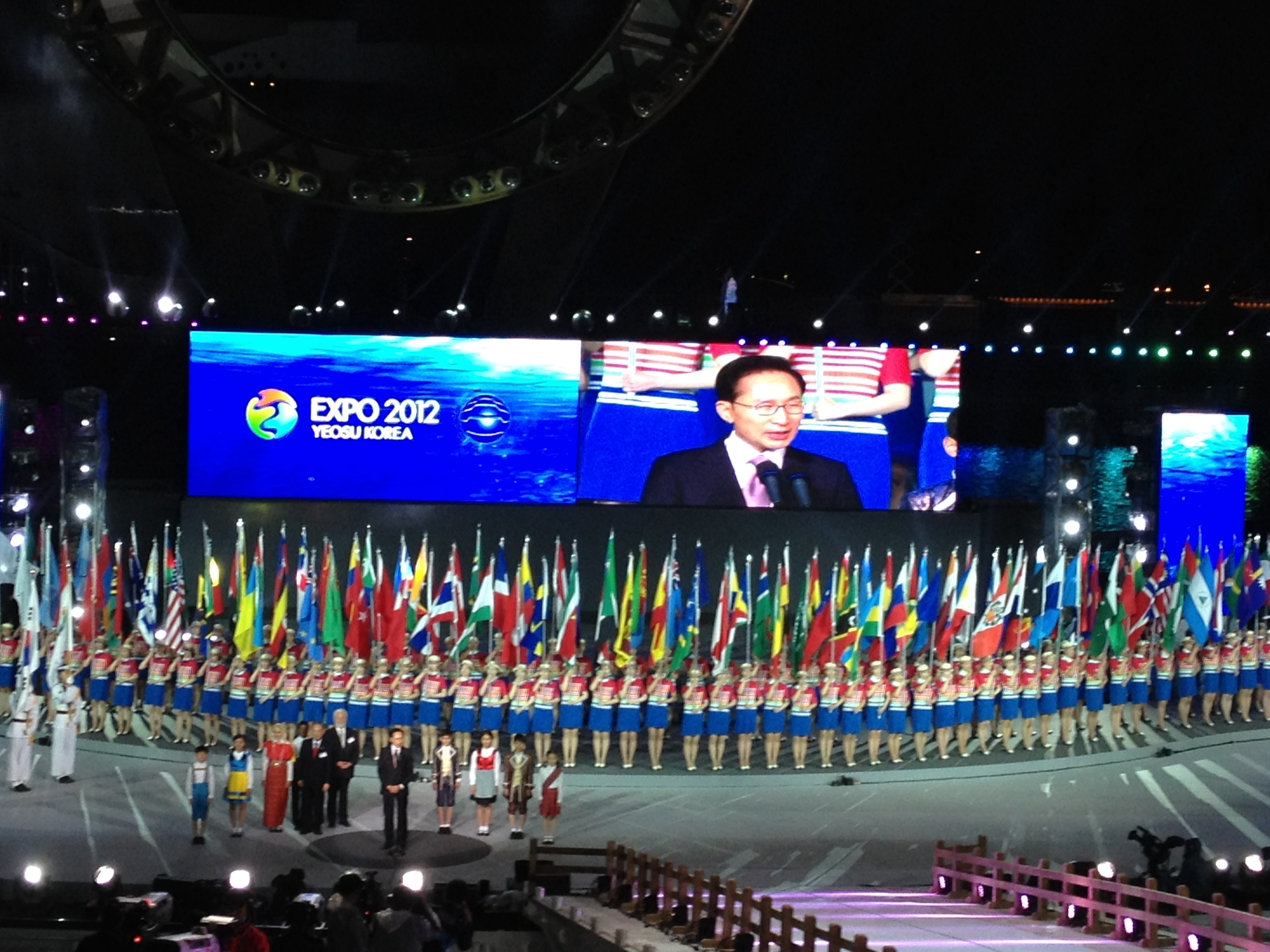 La declaración de apertura de la Exposición estuvo a cargo del Presidente de la República de Corea, Lee Myung-bak.